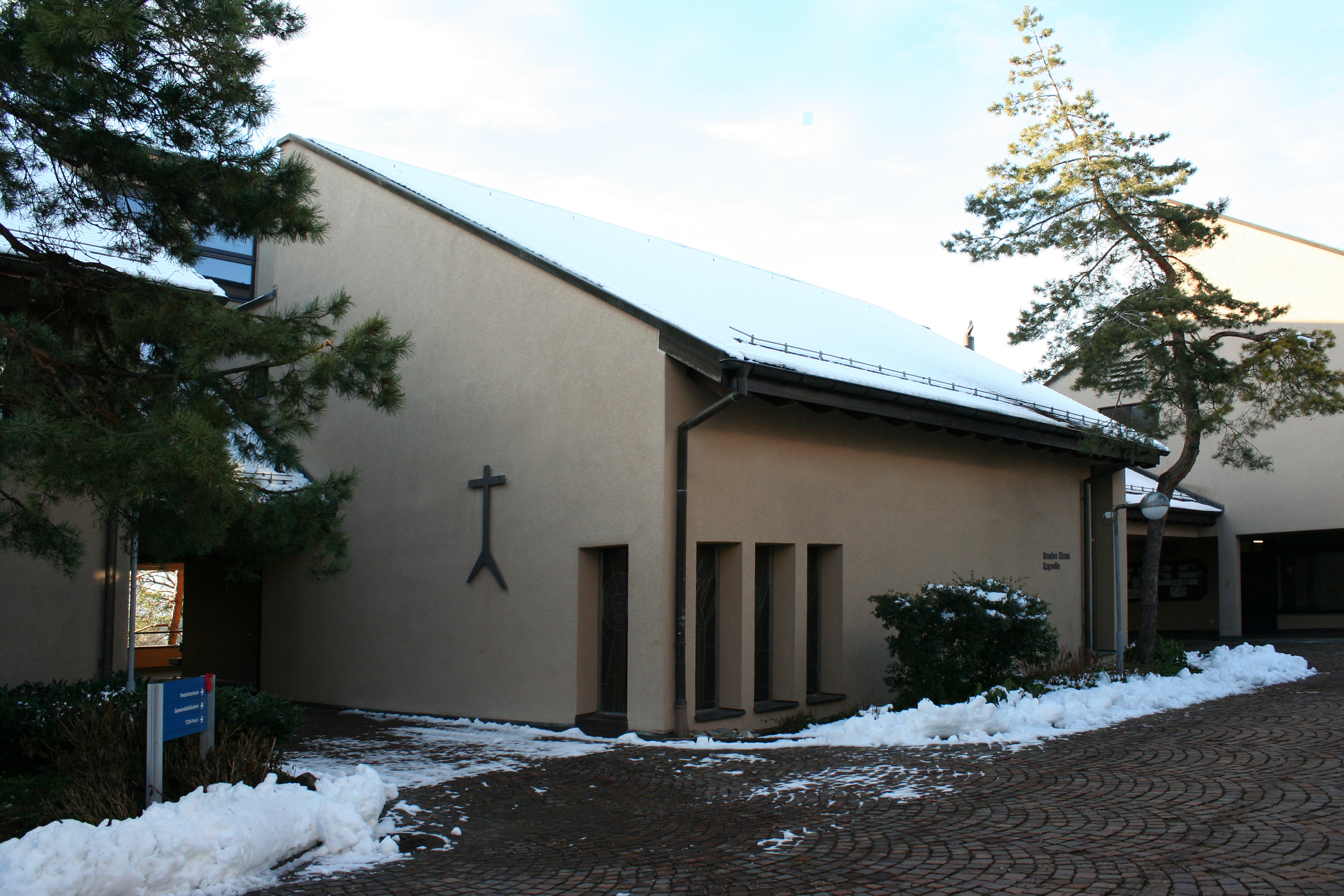 Römisch-katholische Kirche Bruder Klaus Zumikon aussen